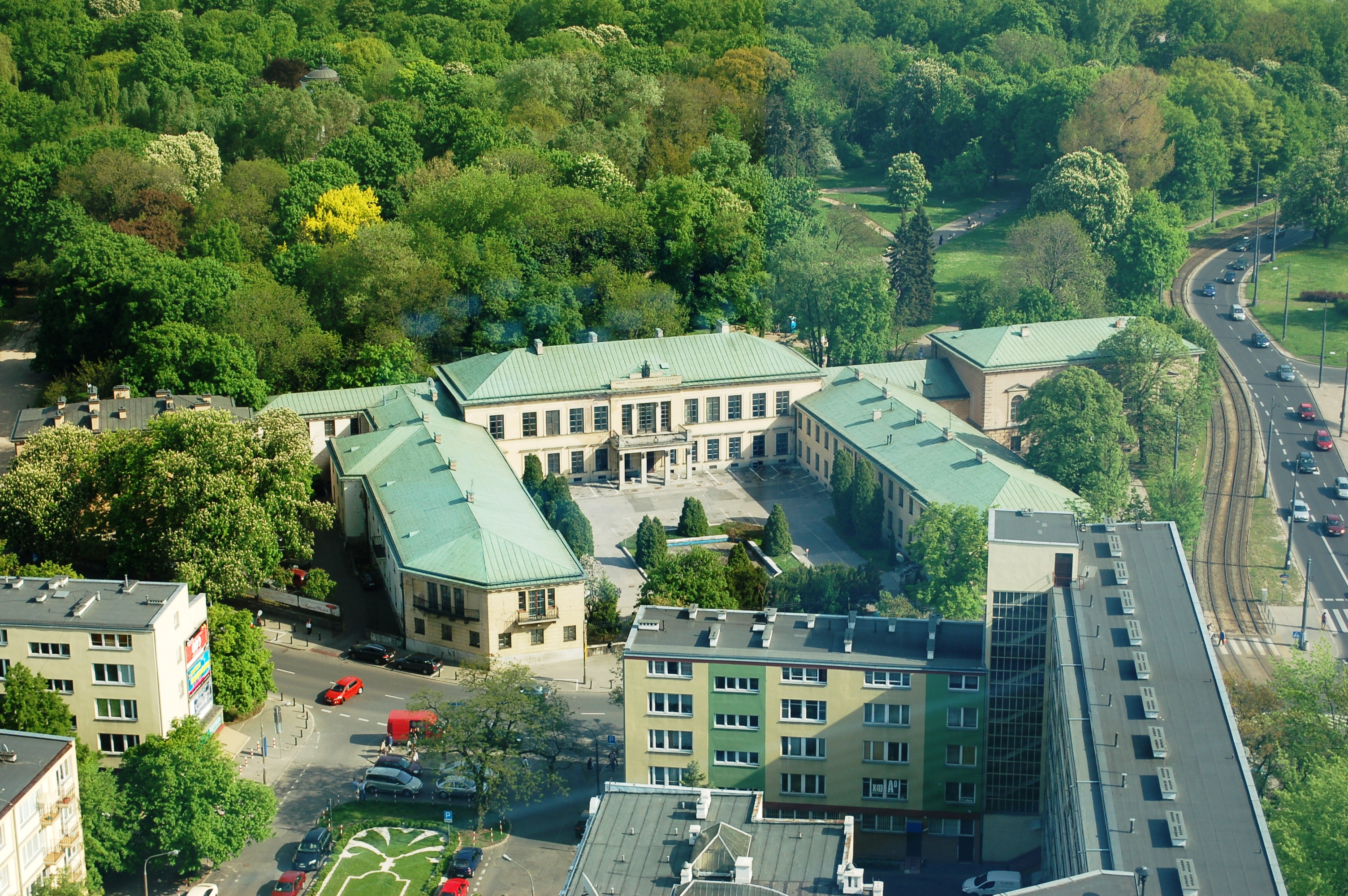 Warschau, Pałac Błękitny, auch Zamoyski-Palast